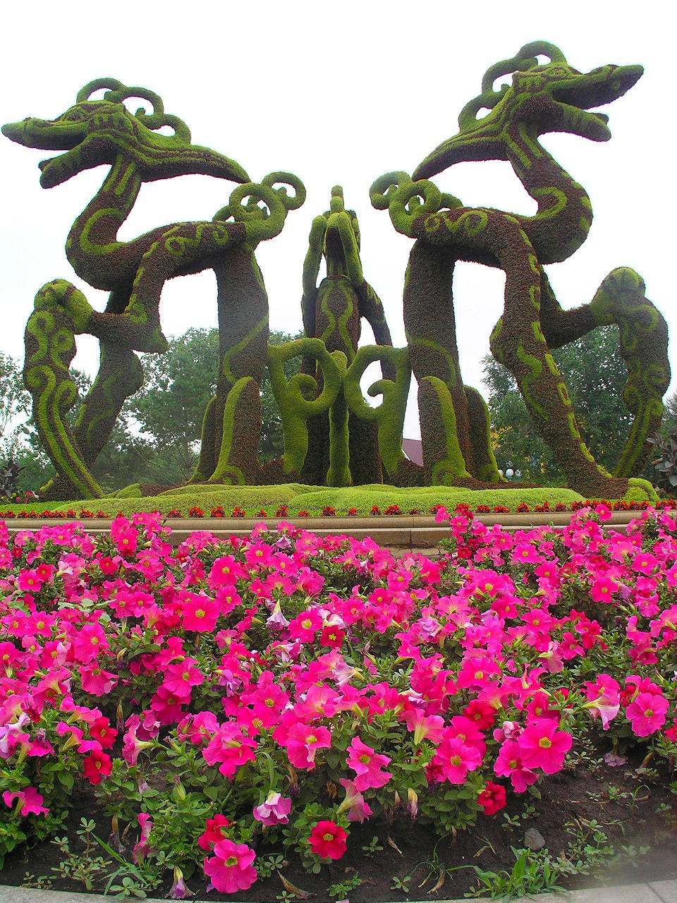 ドラゴンとペチュニア 太陽島公園